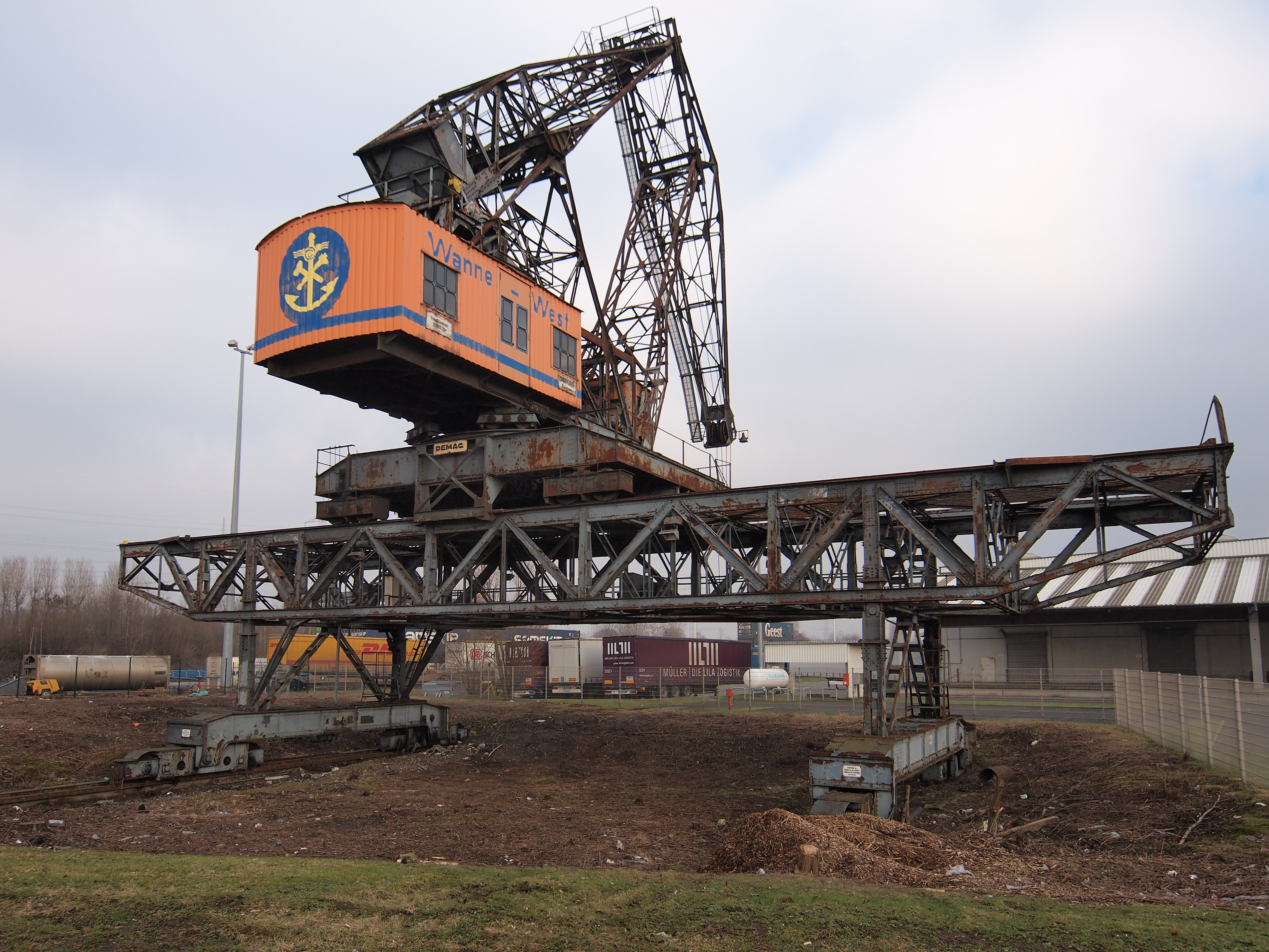 Ehemaliger Hafenkran eines früheren Hafenbeckens im Hafen Herne West am Rhein-Herne-Kanal, Denkmal in Herne-Wanne, Am Westhafen